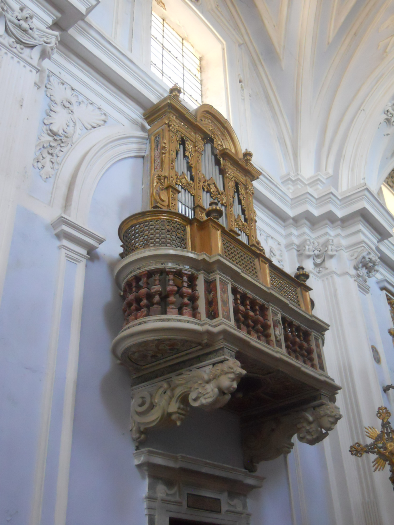 La cantoria sinistra con l'organo di Giuseppe de Martino del Santuario della Santissima Annunziata in Gaeta nell'attuale sistemazione